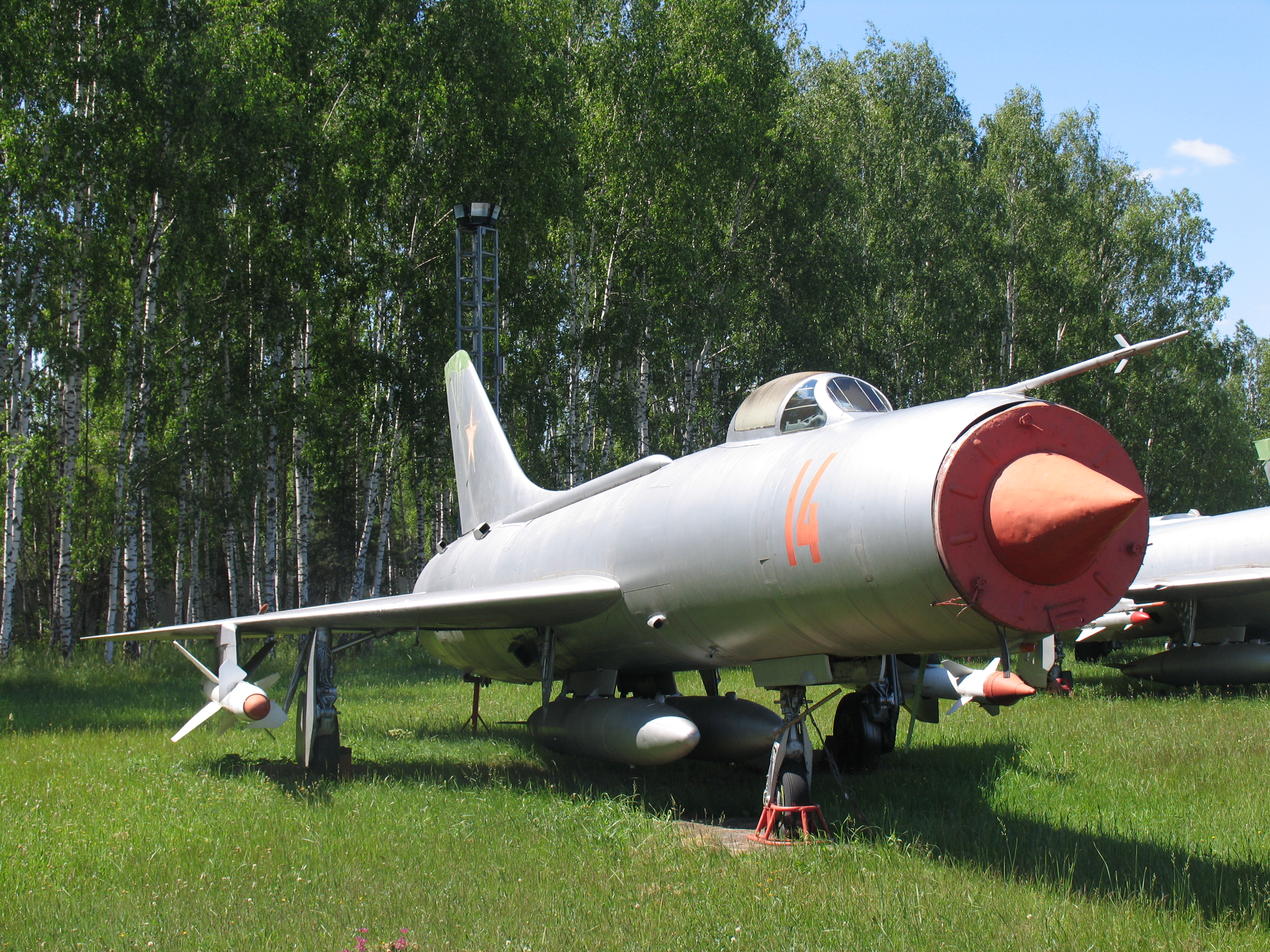 Су-11. Изготовлен в 1962 году. Первый полёт 13 августа 1962 года. С 27 апреля 1963 года по 13 июля 1973 года эксплуатировался ВВС СССР. Выполнил 283 полёта, налетав 199 часов. В музей передан 17 июля 1973 года.